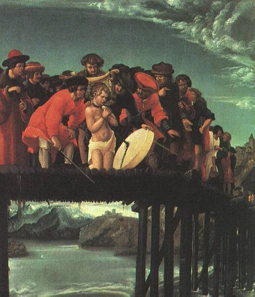 Tafel aus der Floriansfolge